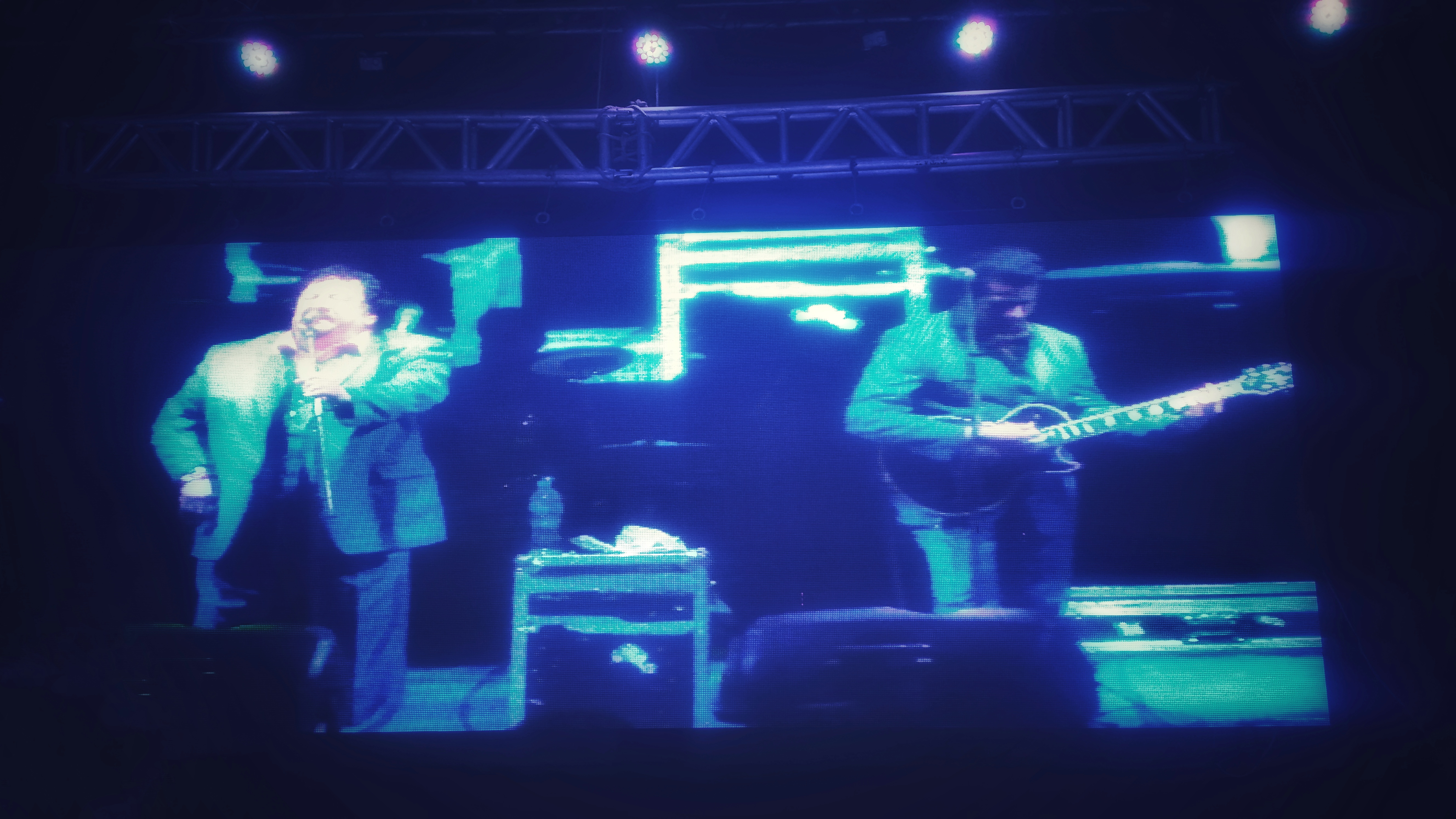 Los Caminantes en vivo 2014 en San Francisco del Rincón, Gto.